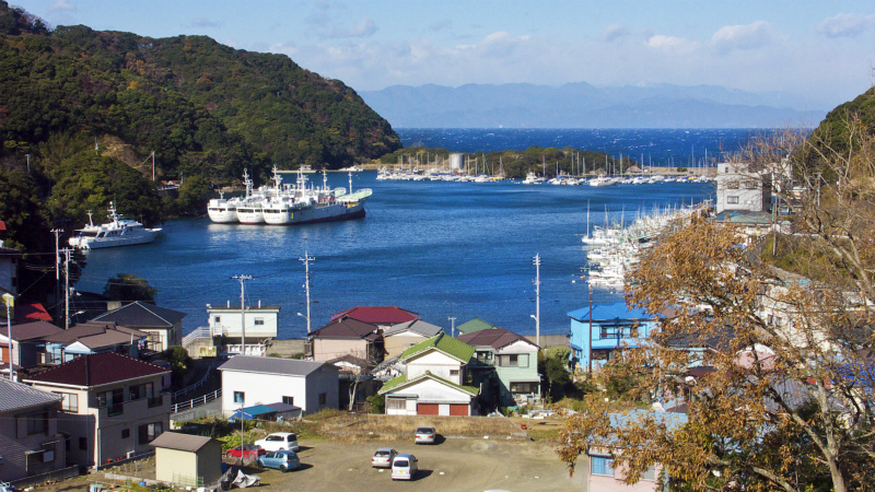 westcoast@izu